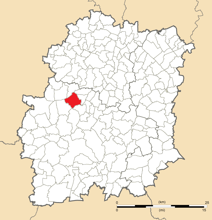 Carte de position de Saint-Chéron en Essonne (91)